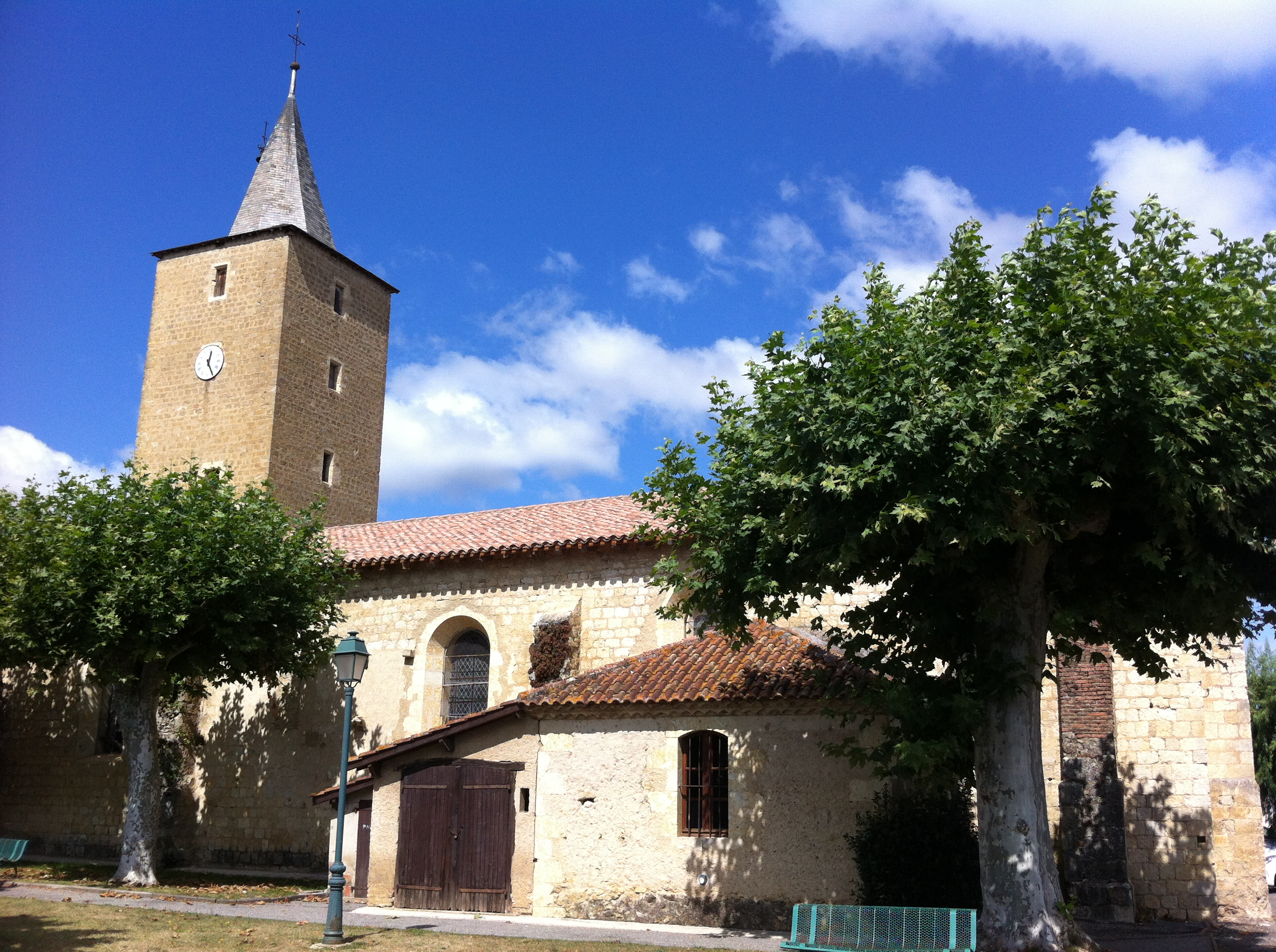 Église de Pavie (Gers, France)